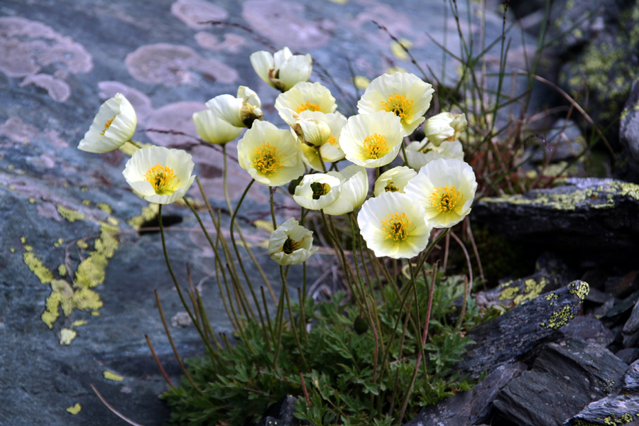 Altay mountains (flora), Photo by Vít Hněvkovský, 2006 Altaj (flóra)